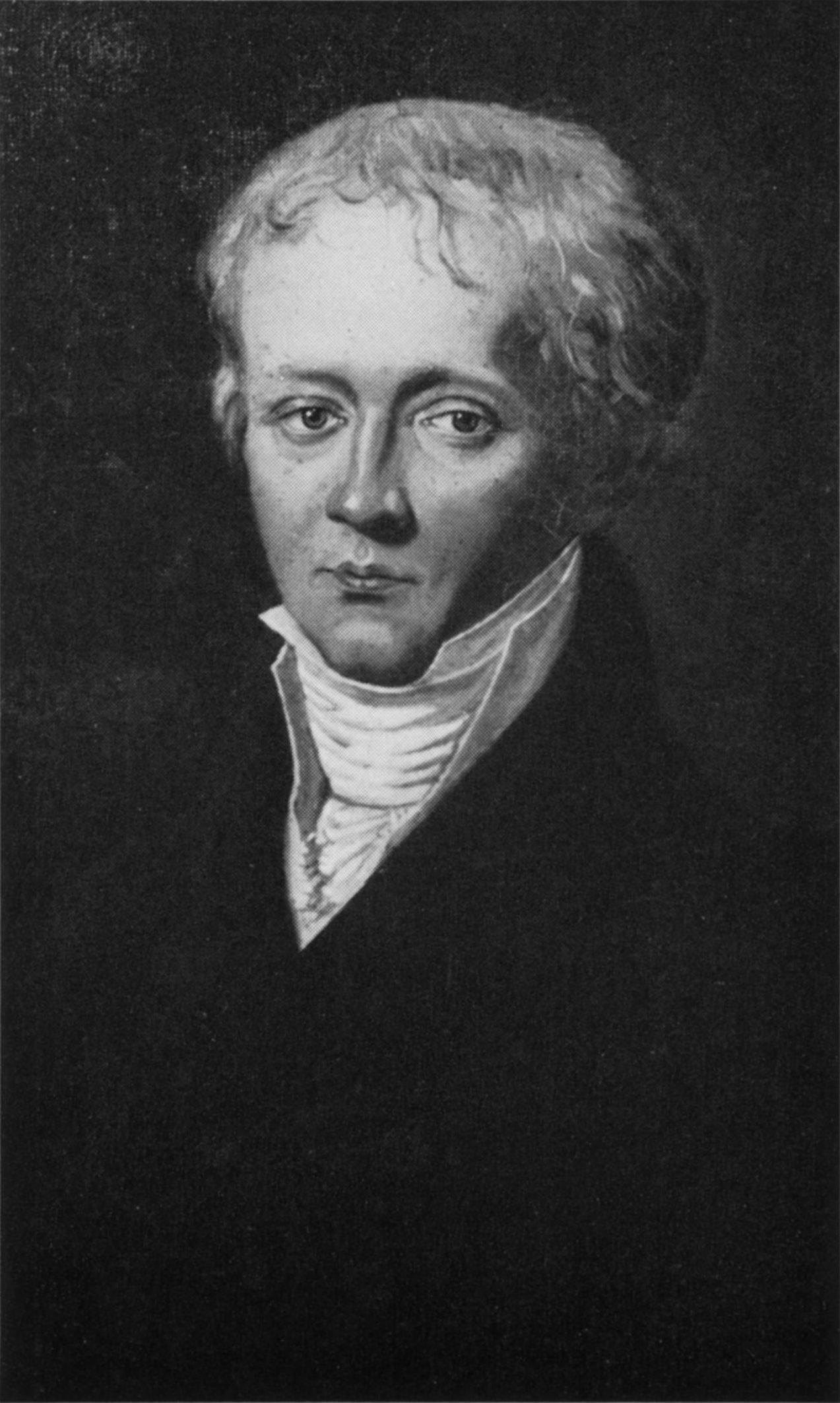 Isaac von Sinclair, Gemälde von Favorin Lerebours, 1808, Museum im Gotischen Haus, Bad Homburg v.d.Höhe